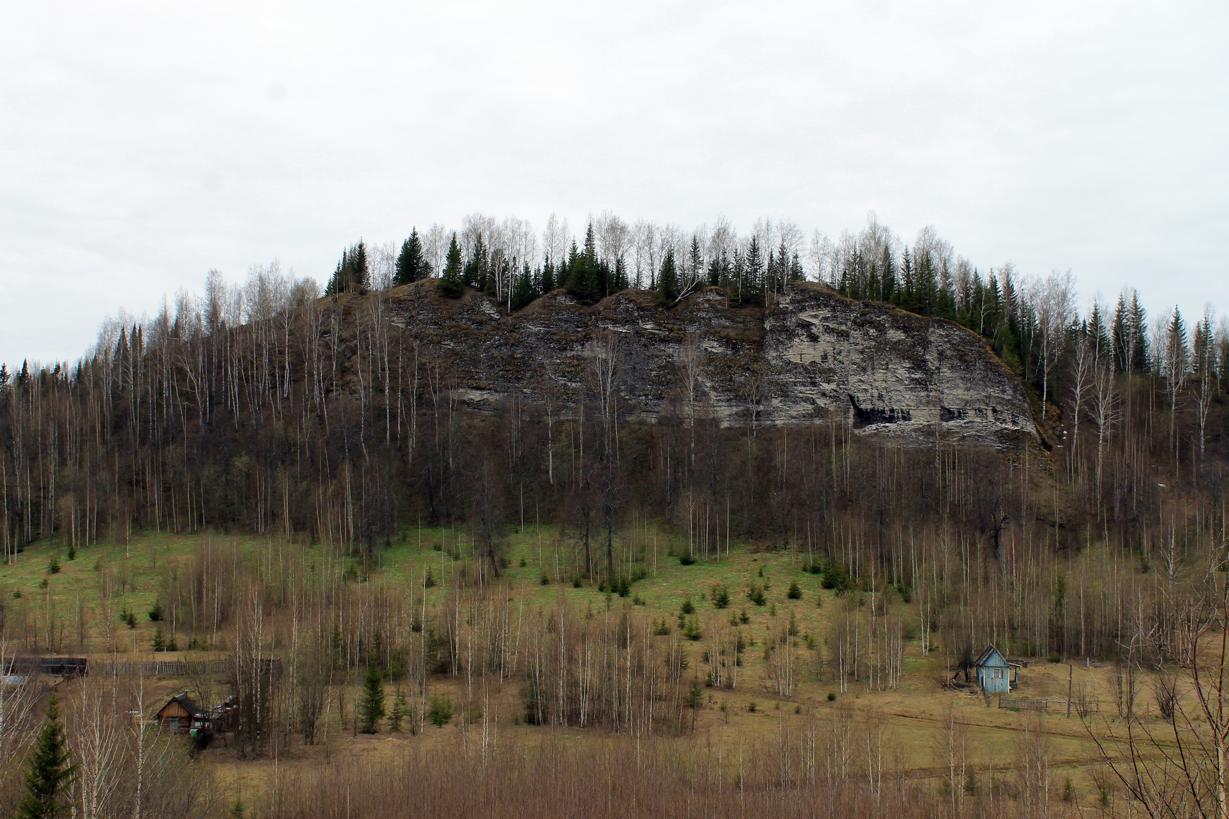 Лысая гора, п. Расик, г. Кизел